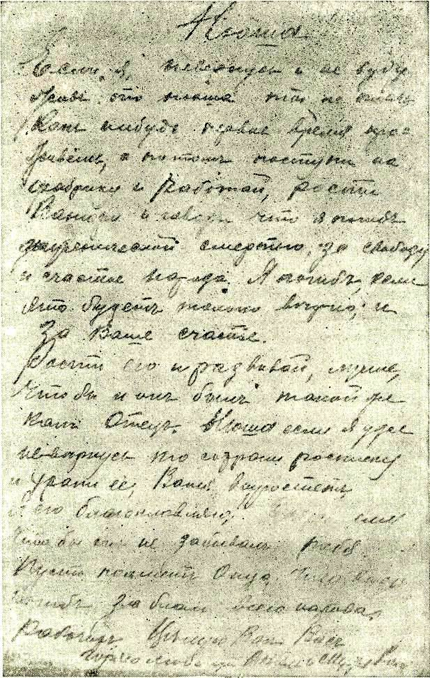 Прощальное письмо рабочего Ивана Васильевича Васильева, погибшего 9 января 1905 года у Нарвских триумфальных ворот.